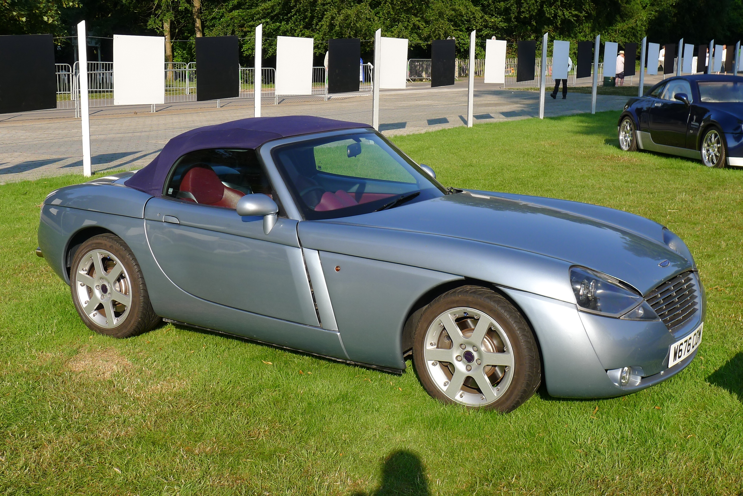 Jensen S-V8